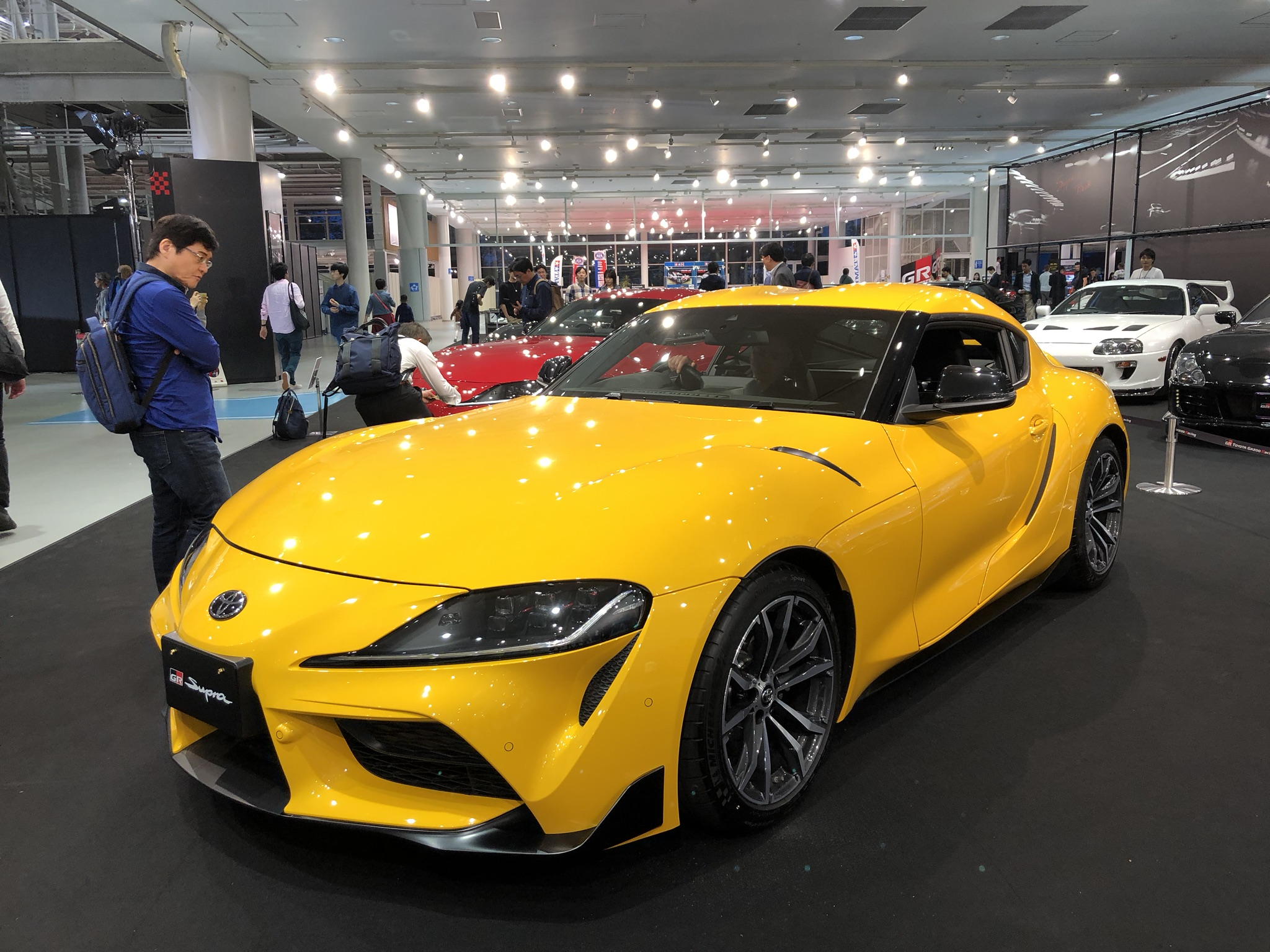 トヨタ・GRスープラの外観